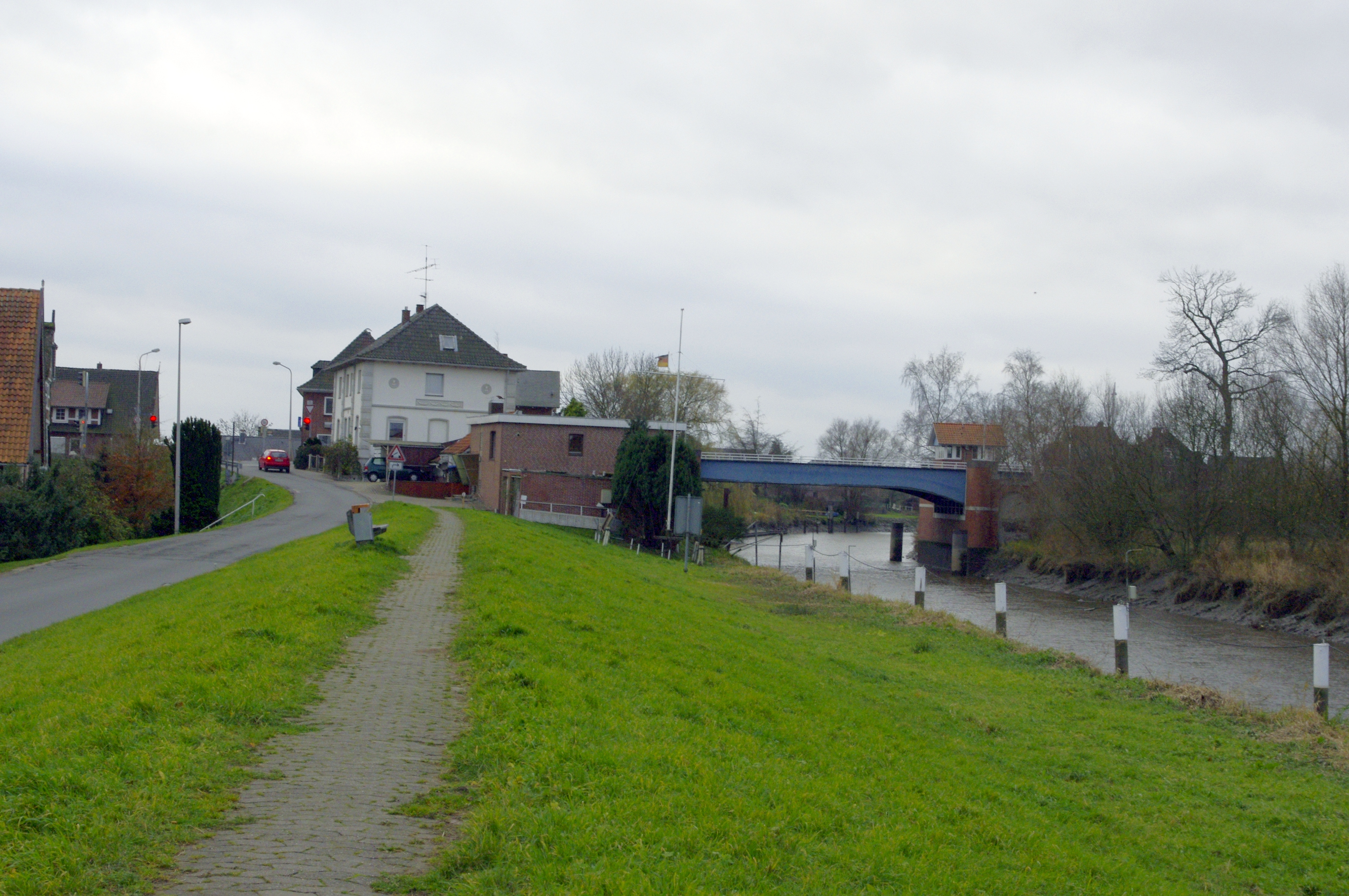 Groß-Hove, Jork. Blick vom Deich Richtung Brücke über die Este.